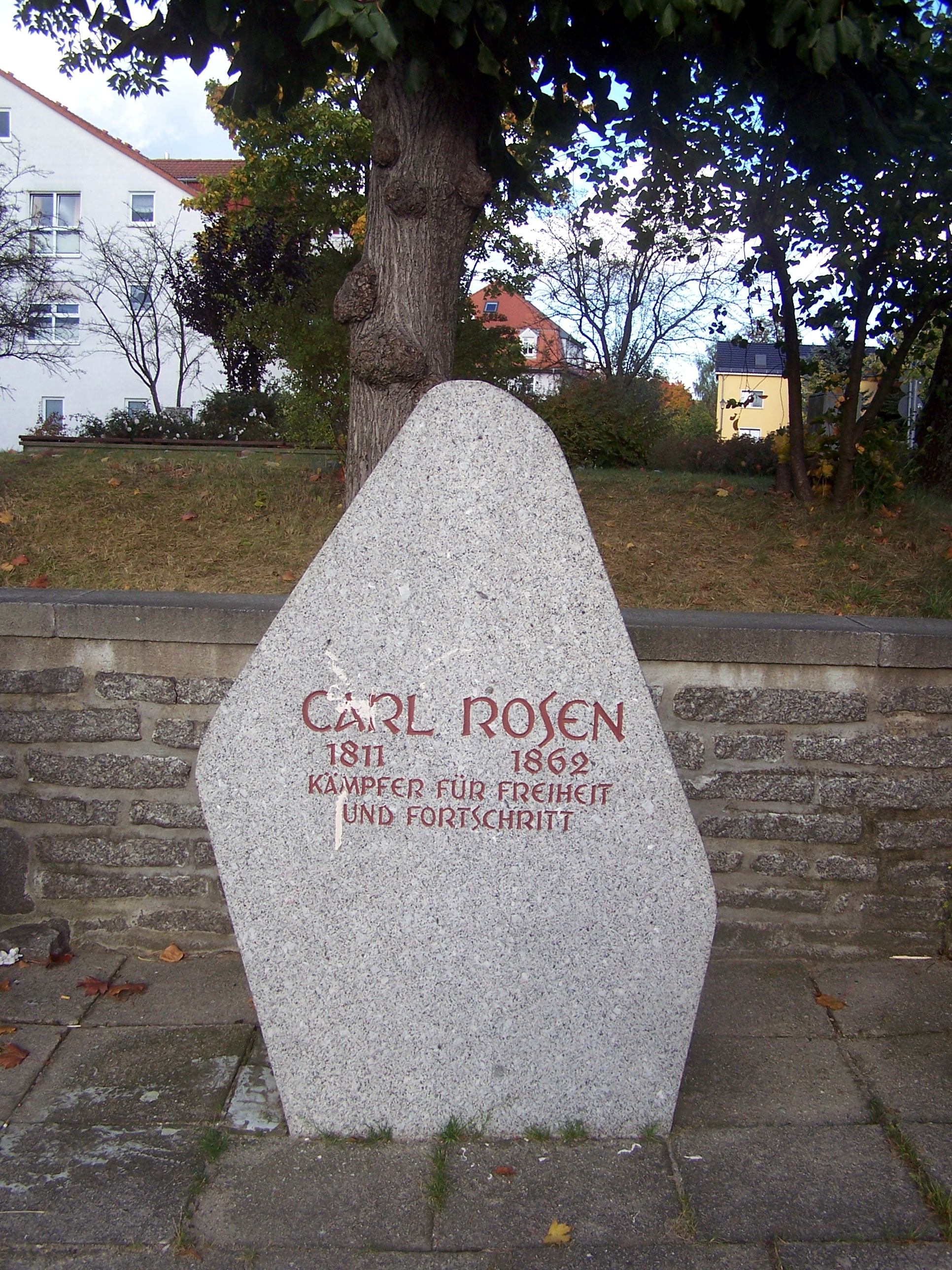 Gedenkstein für Carl Rosen auf dem Rathausvorplatz in Großröhrsdorf